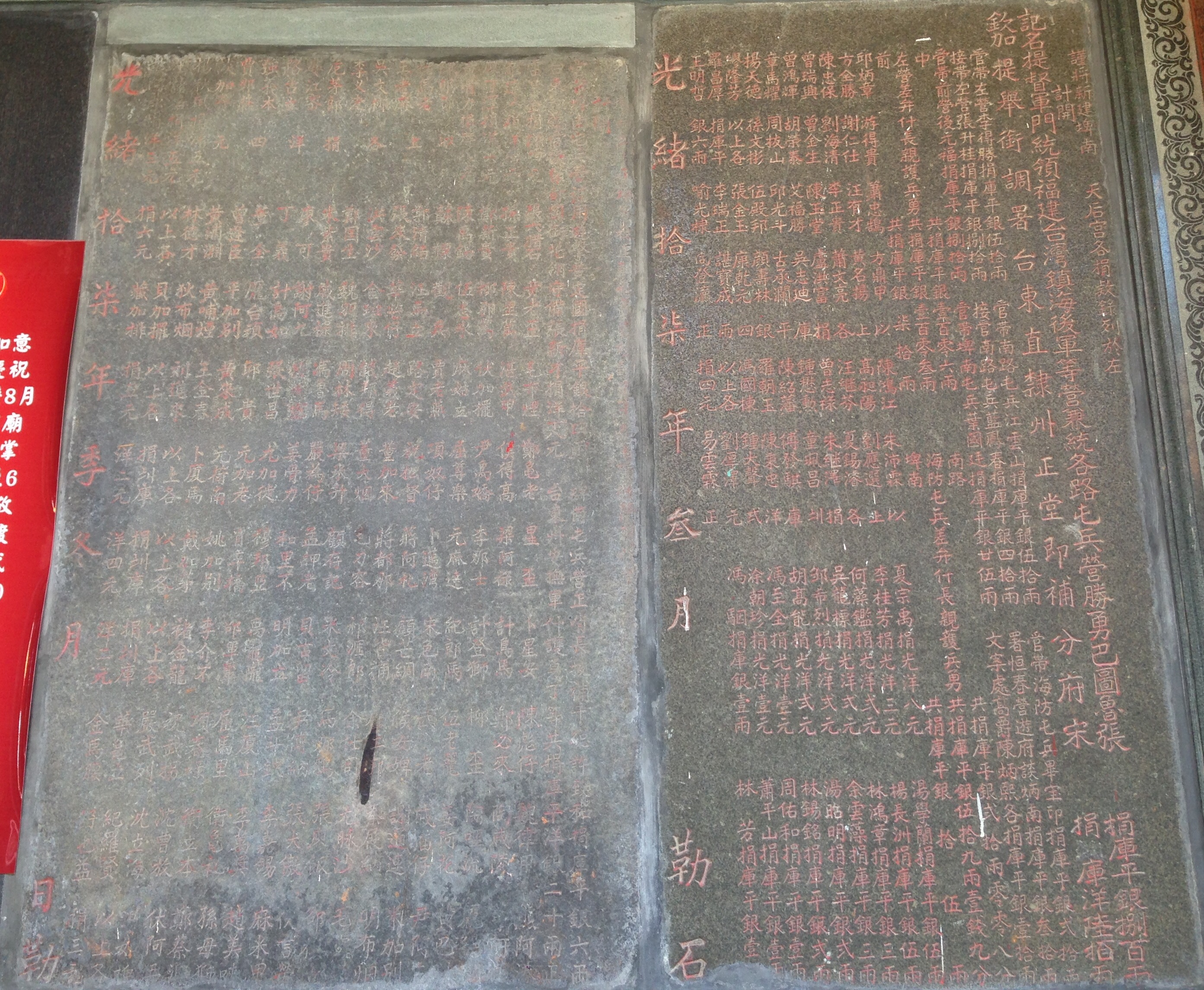 中文（台灣）: 埤南天后宮碑記2